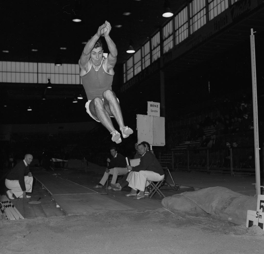 in der Ostseehalle. Im Bild der Polizist Hans-Helmut Trense belegt im Dreisprung den zweiten Platz.